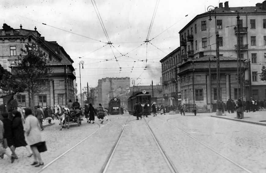 Ulica Wolska w Warszawie, widok w kierunku ul. Chłodnej. Widoczne pawilony rogatkowe - rogatki Wolskie